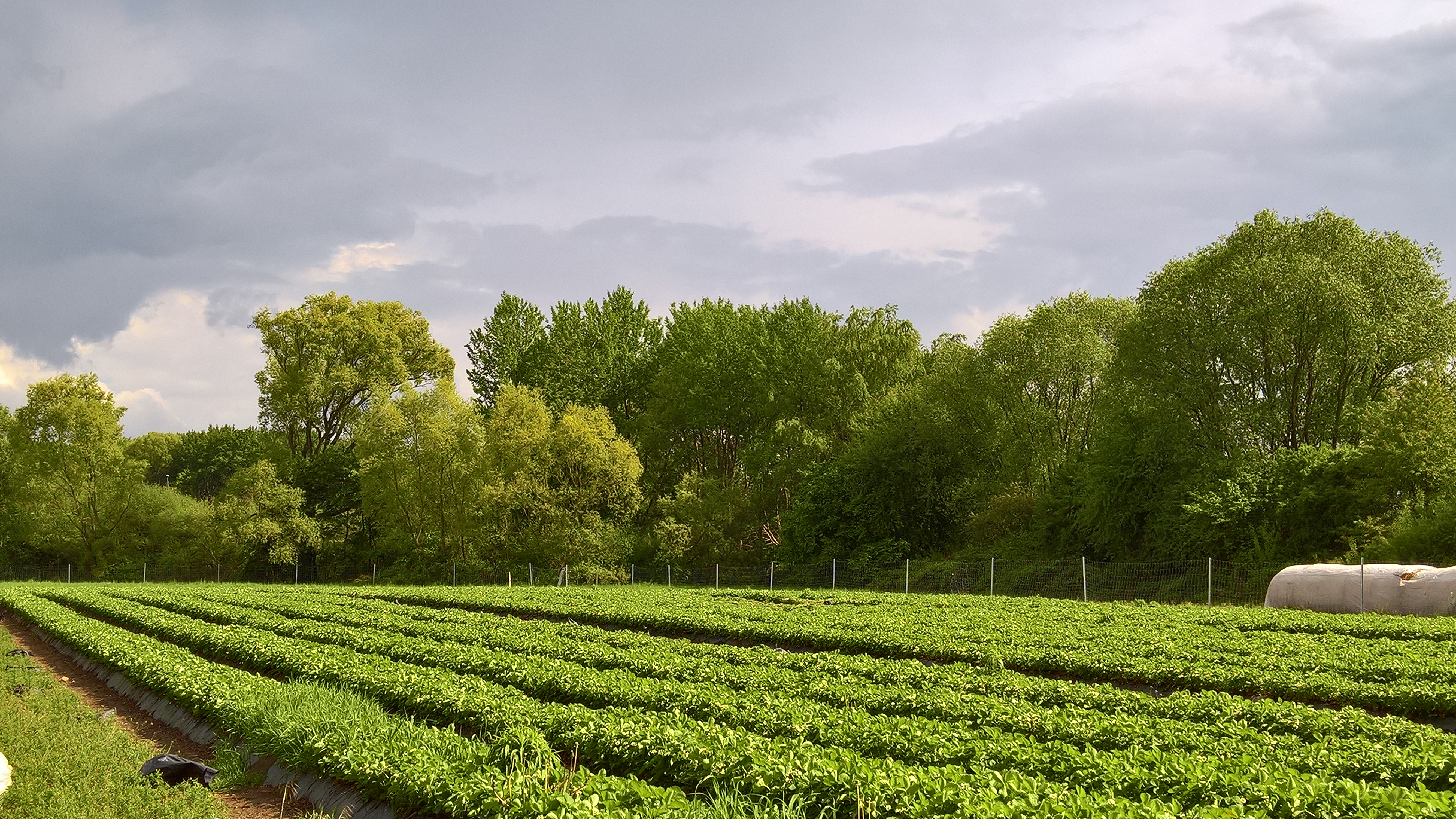 Das Naturdenkmal "Wasserfläche mit Gehölz und Schilf bei Darmstadt-Arheilgen" Teil Gewann "Auf der Platte" nordwestlich des Rangierbahnhofs Kranichstein